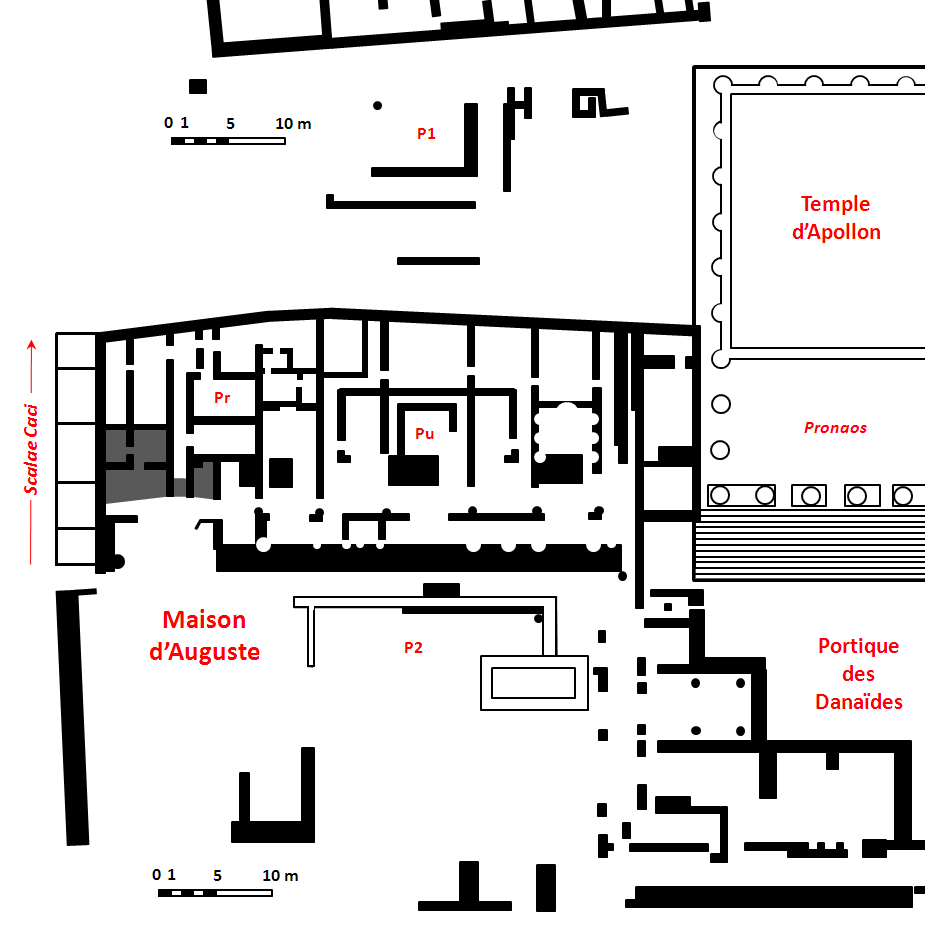 Plan de la maison d'Auguste sur le Palatin (d'après document affiché sur site).